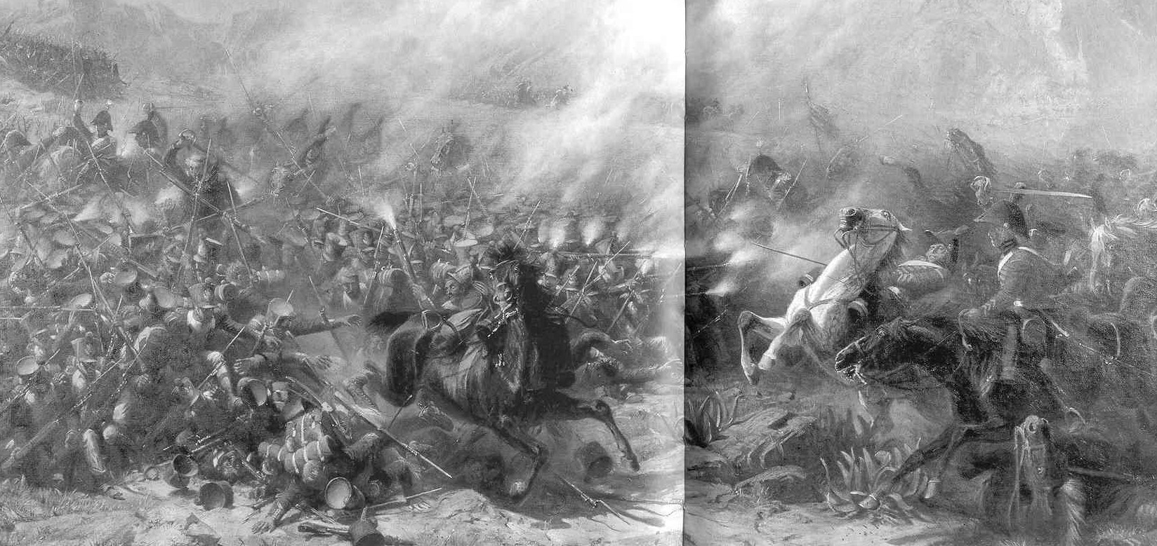 Die Schlacht von Garcia Hernandez, Gemälde von Adolph Northen, Niedersächsische Landesgalerie Hannover